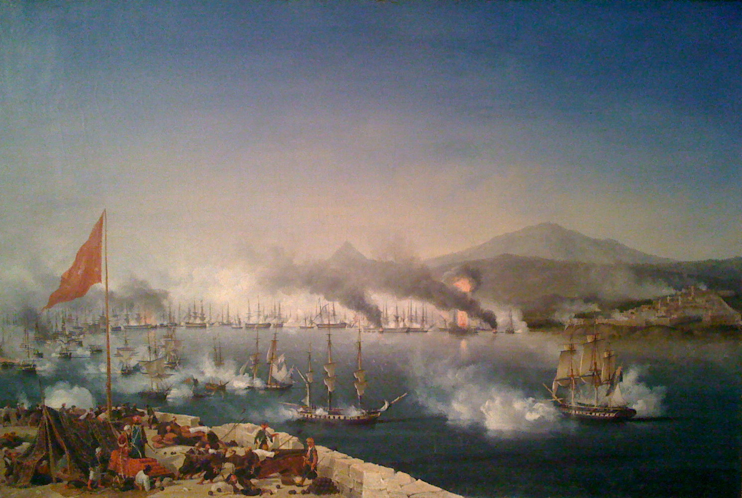 La bataille navale de Navarin Huile sur toile de 1827 par Louis Ambroise Garneray (1783-1857) Pièce du Musée national historique de Grèce exposée à l'Institut et musée Voltaire de Genève (Suisse)